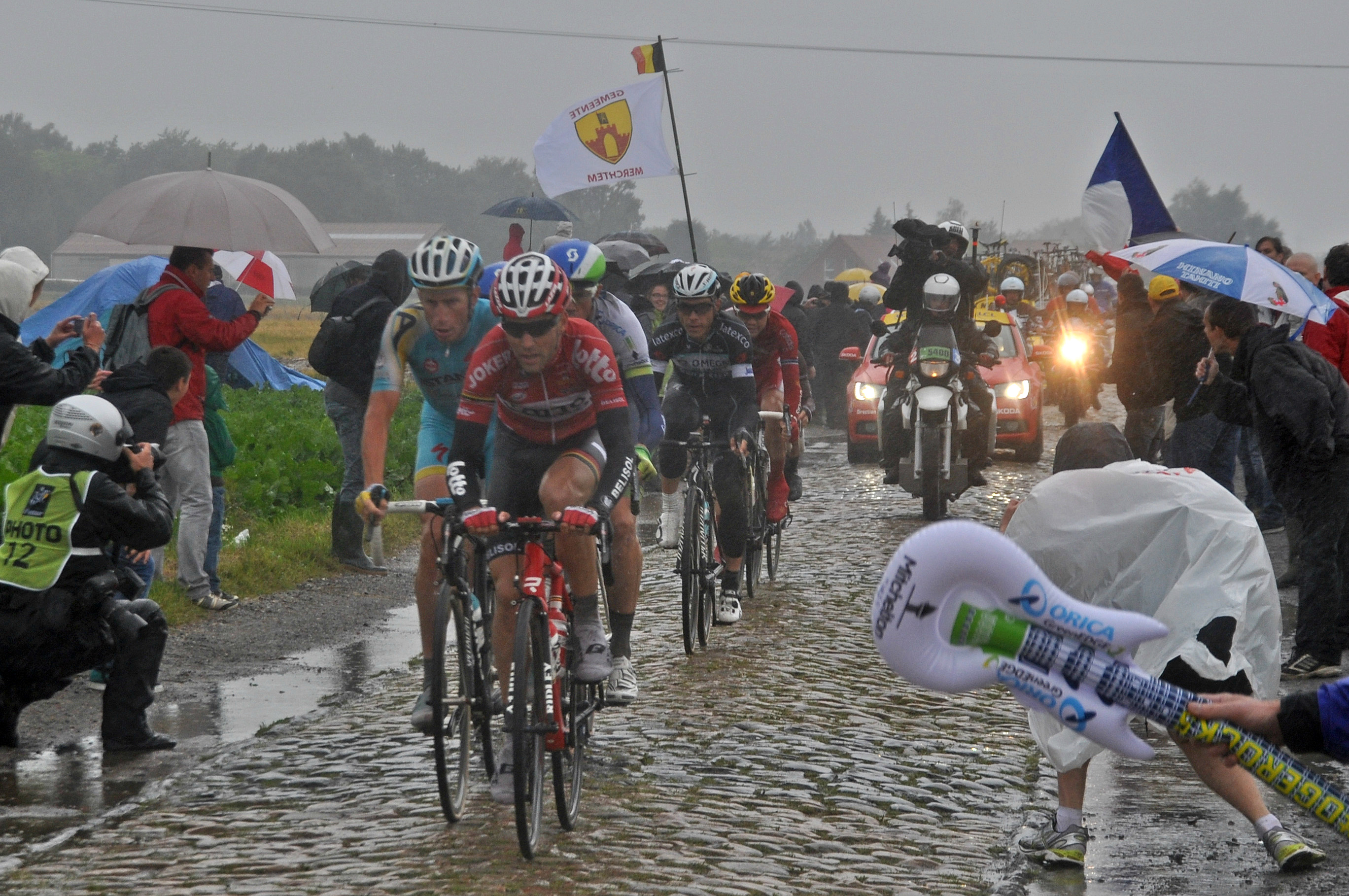 L'échappée TDF2014 Etape 5 Gruson